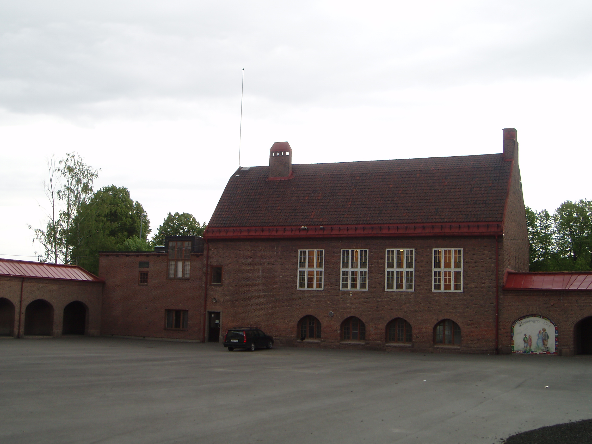 Brandengen skole i Drammen i Buskerud fylke i Norge.